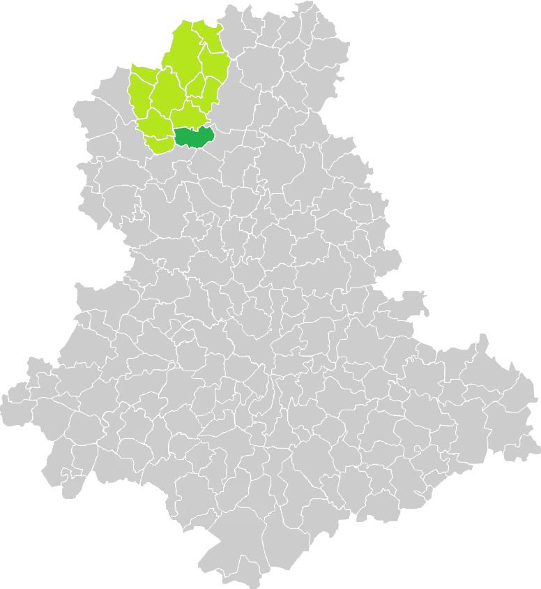 Carte de situation de la commune de Saint-Ouen-sur-Gartempe (en vert foncé) dans le votre Canton (en vert clair) sur une carte des communes de la Haute-Vienne